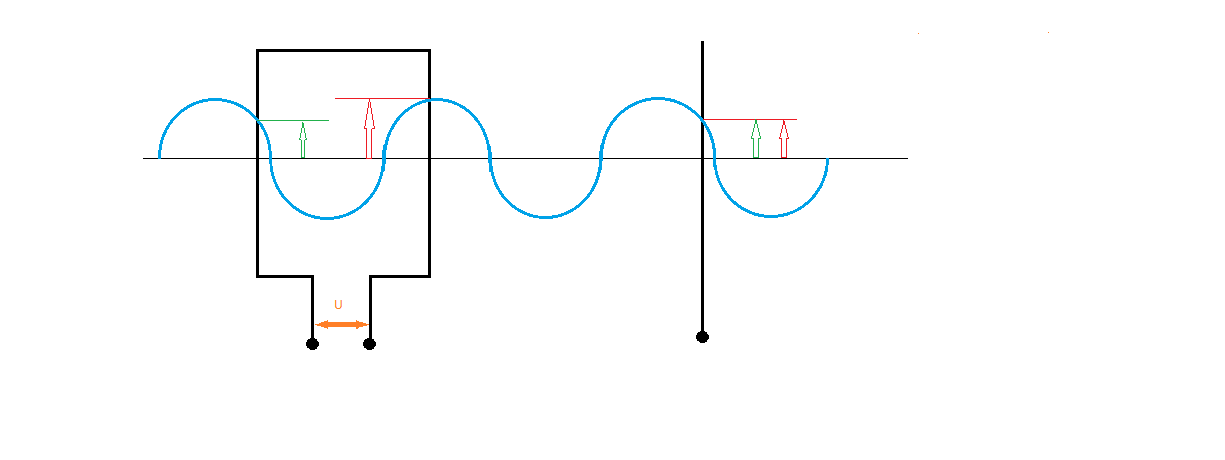 loop antenne: wanneer de radiogolven op de antenne invallen in het vlak van de antenne zal er een spanning opgewekt worden. Wanneer het signaal loodrecht invalt op de antenne heffen de groene en rode component elkaar op.